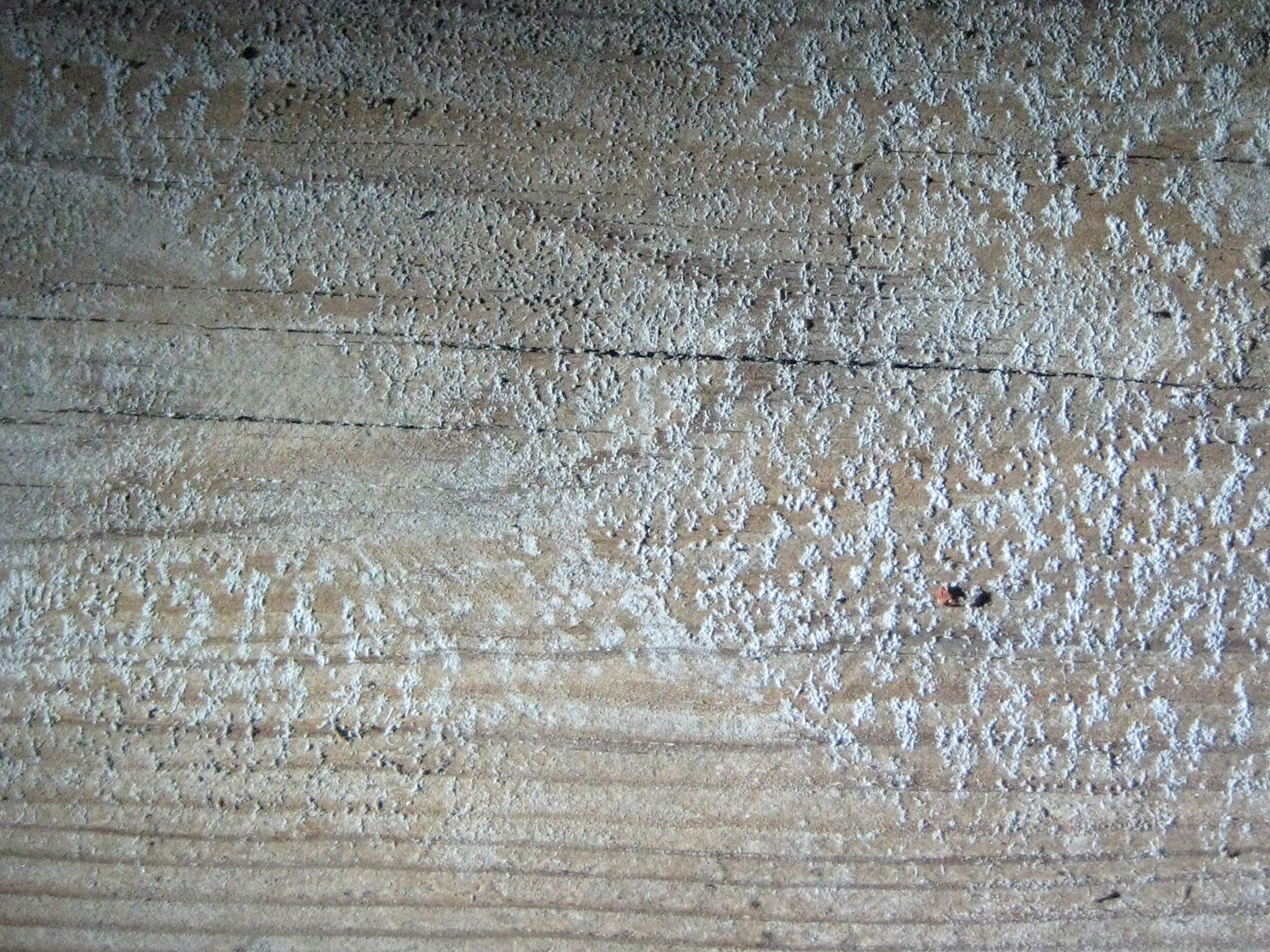 Nahaufnahme einer mit DDT-haltigem Holzschutzmittel behandelten Holzoberfläche. Aufgenommen in der Dachkonstruktion einer Kirche in Ostdeutschland